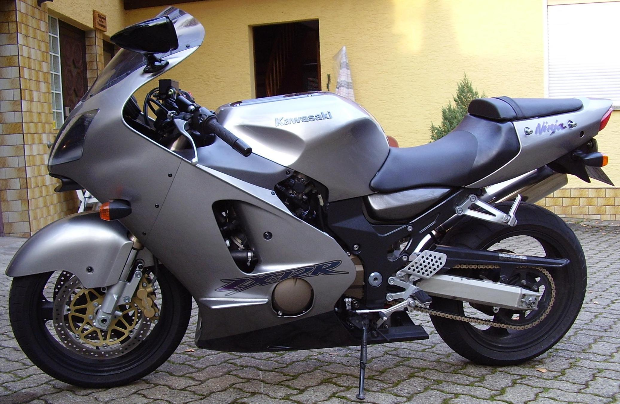 Kawasaki ZX-12R 2001